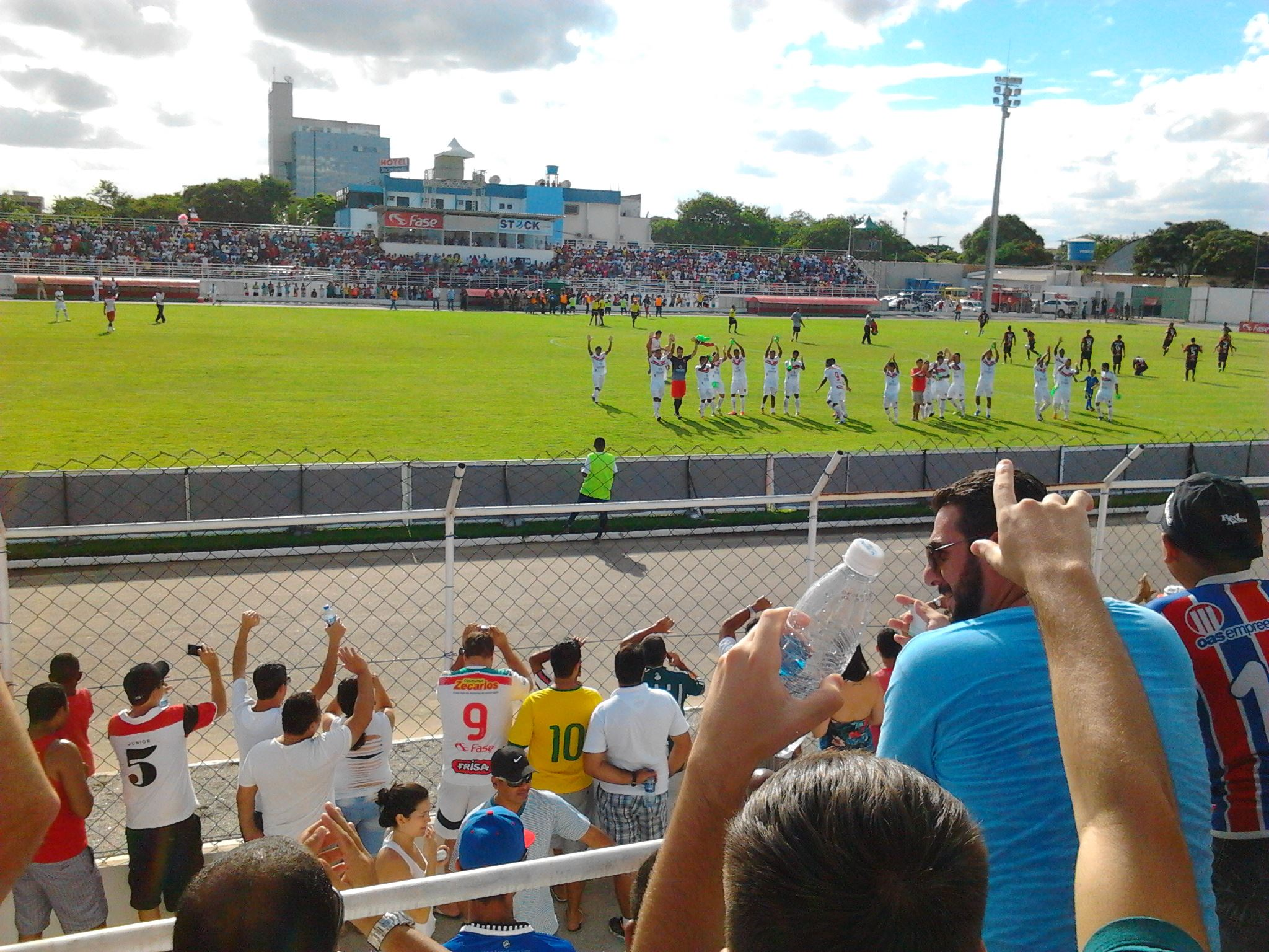 Partida entre Serrano x Vitória, no estádio Tomatão. Campeonato Baiano 2014 Teixeira de Freitas (BA)